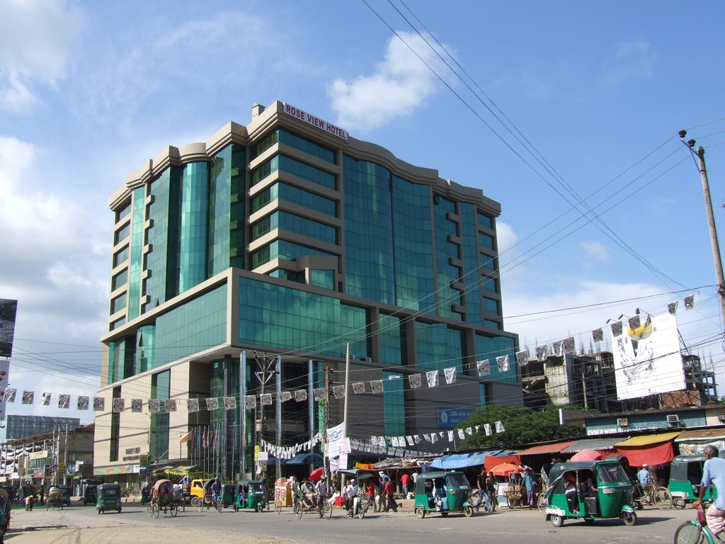 Rose View Hotel Sylhet (by tanvir)